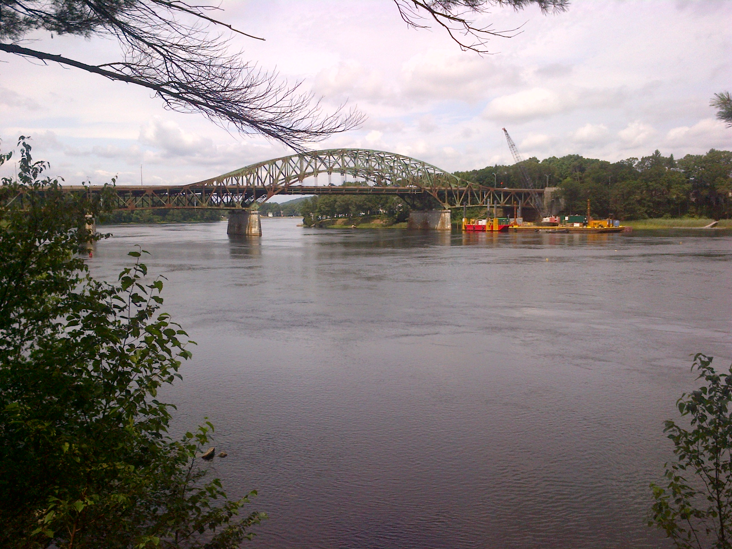 Whittier Bridge, August 8, 2013